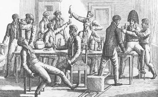 Göttinger Studentenkneipe, Stammbuchblatt von 1816, Rechte abgelaufen, Public Domain